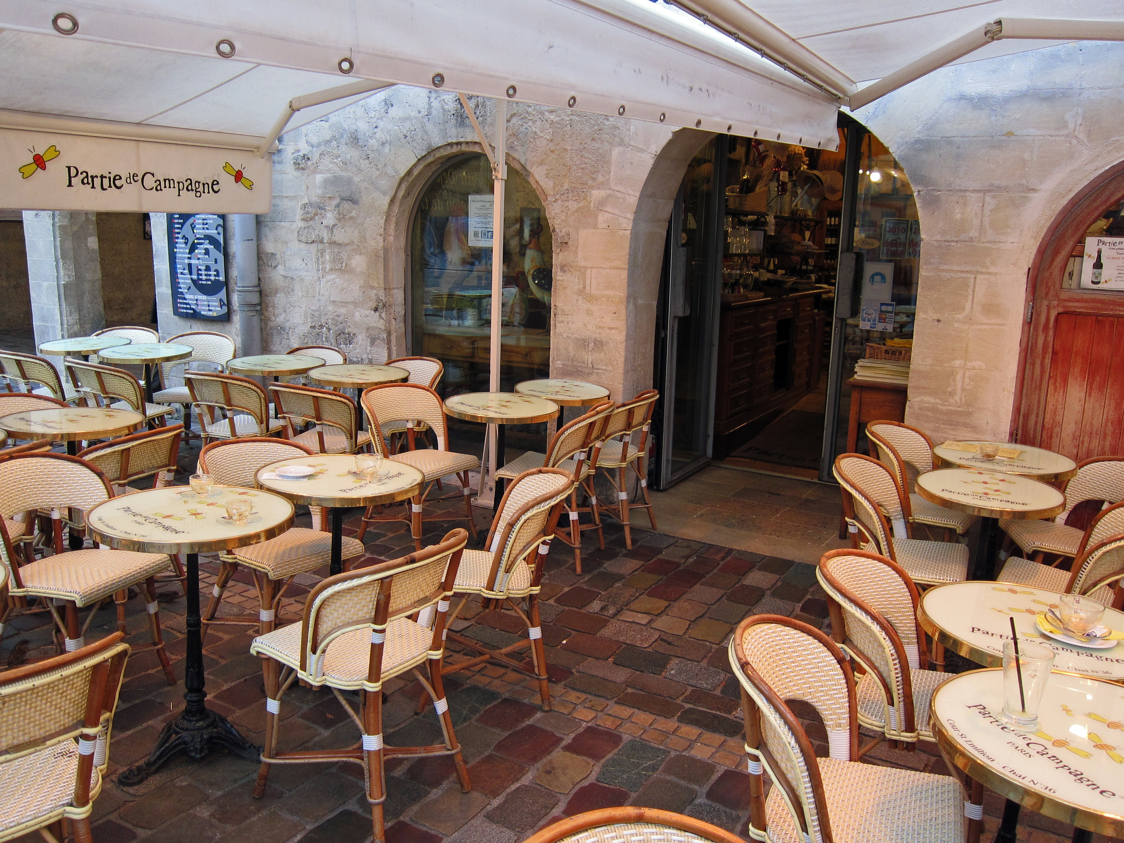 (Paris, Île-de-France, France) : La terrasse du salon de thé "Partie de Campagne" à la cour Saint-Émilion à Bercy Village.